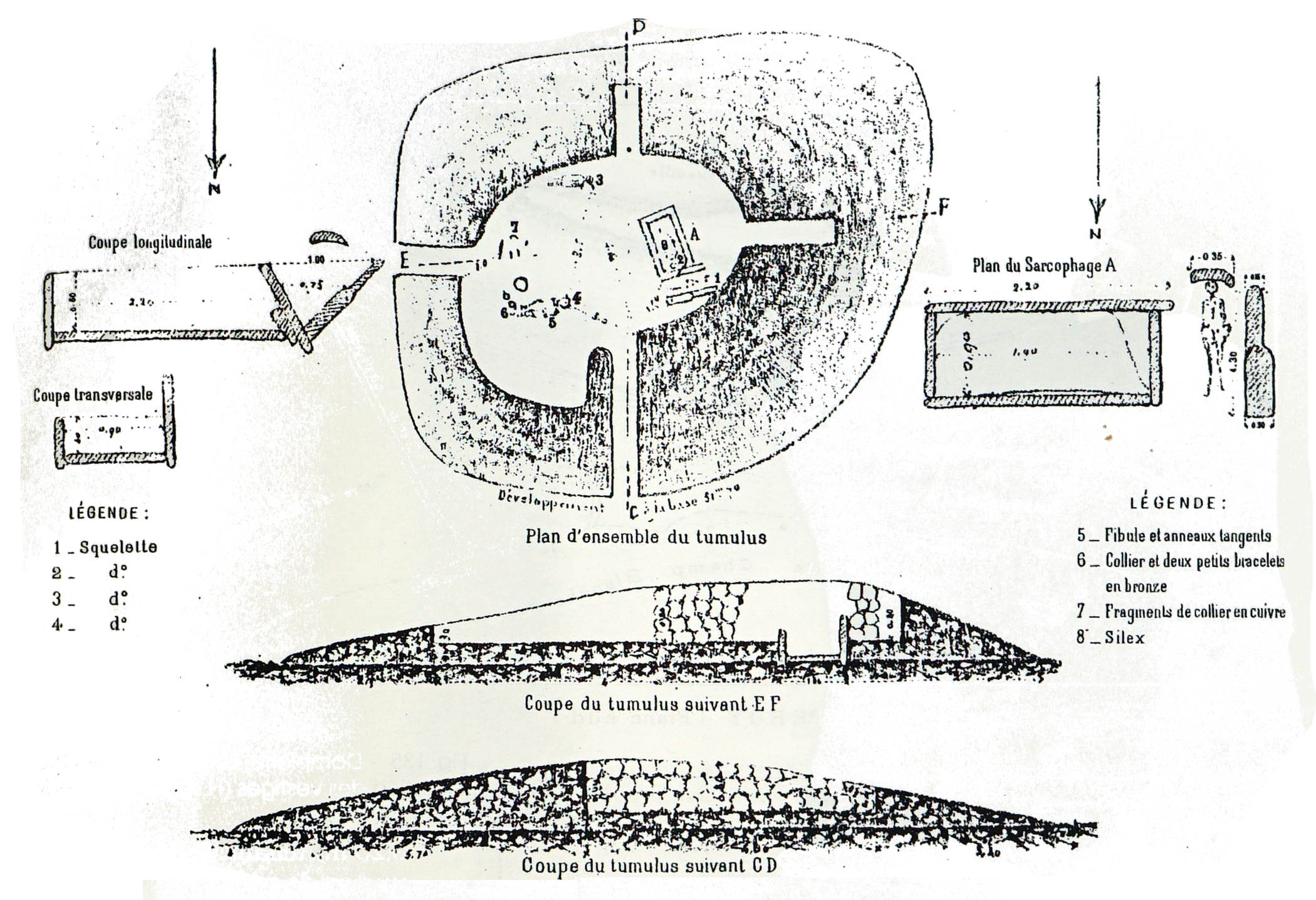 le Tumulus de la Combe Quinot dessin de Cavaniol.